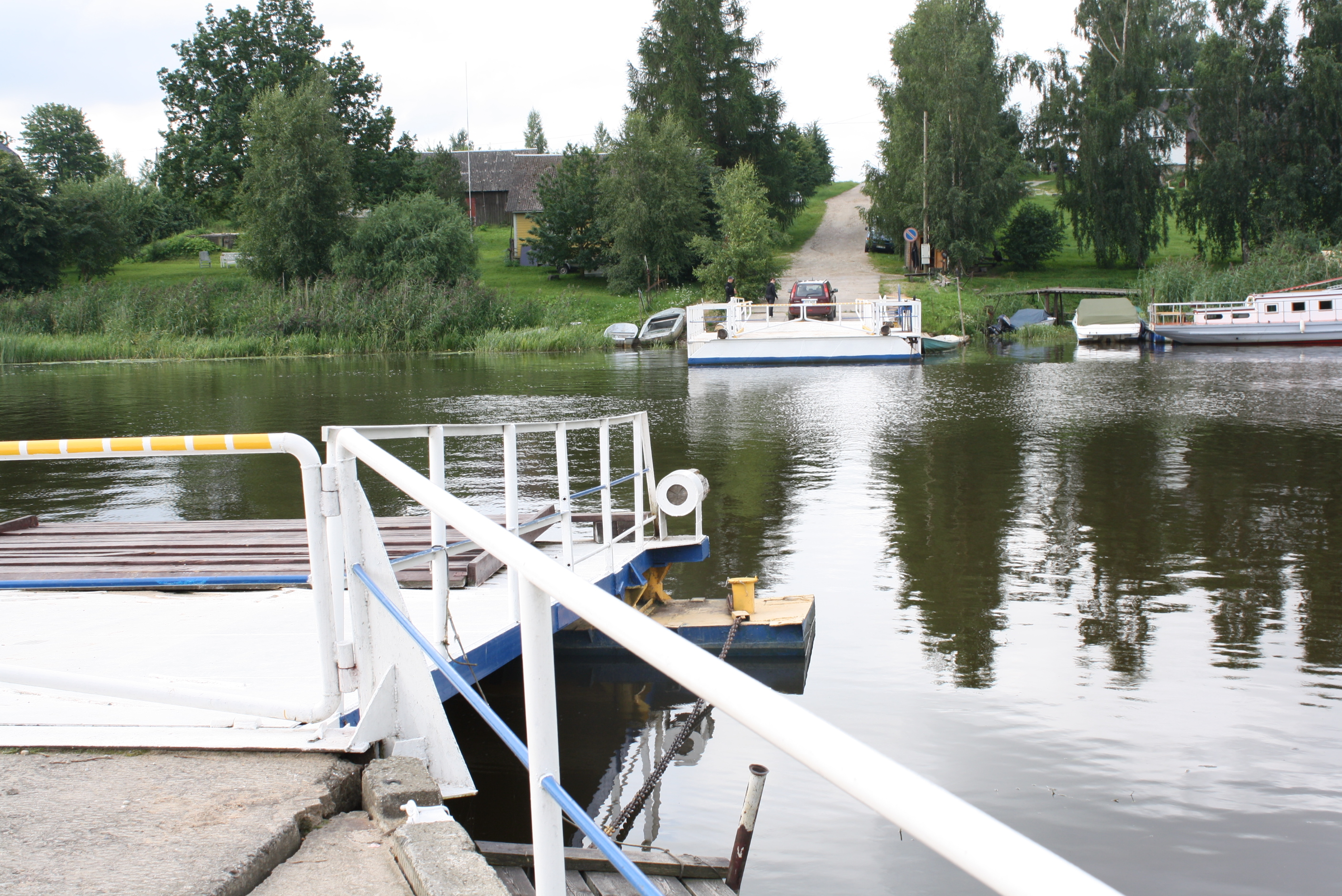 Kavastu parv üle Emajõe